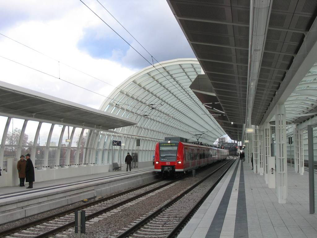 S-Bahnhof Ludwigshafen Mitte am Tag der Eröffnung